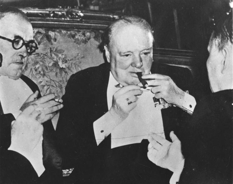 Potsdamer Konferenz, Winston Churchill ADN-ZB/XIII 27.3.1952 [Herausgabedatum] Das Potsdamer Abkommen der drei Großmächte vom Juli 1945 ist die einzige völkerrechtliche Grundlage für einen Friedensvertrag mit Deutschland. Foto von den Verhandlungen in Potsdam UBz.: Premierminister Churchill auf der Potsdamer Konferenz. Abgebildete Personen: Churchill, Winston: Premierminister, Großbritannien (GND 118520776)